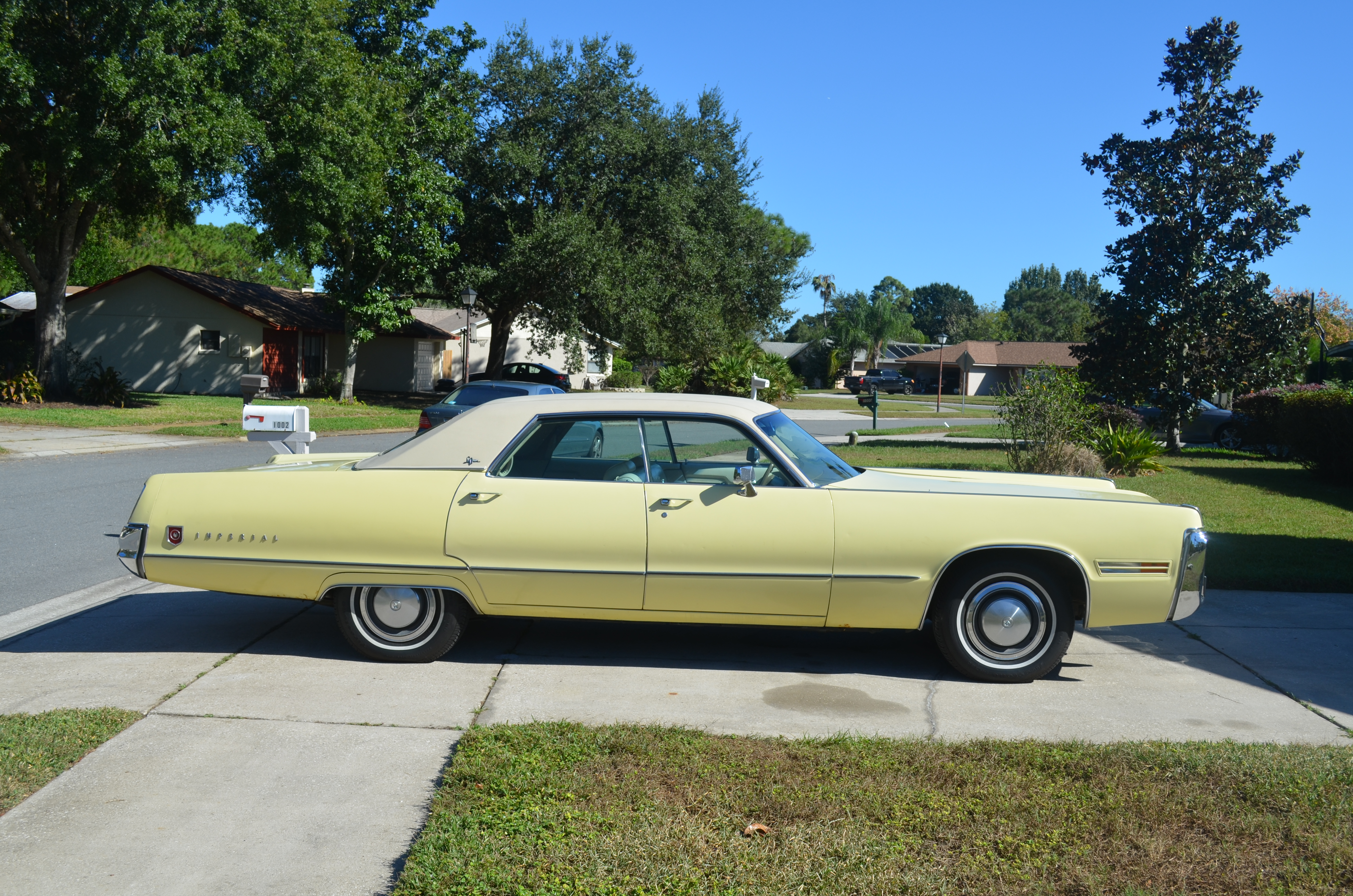 1973 Imperial Le Baron from Mauro Pietro